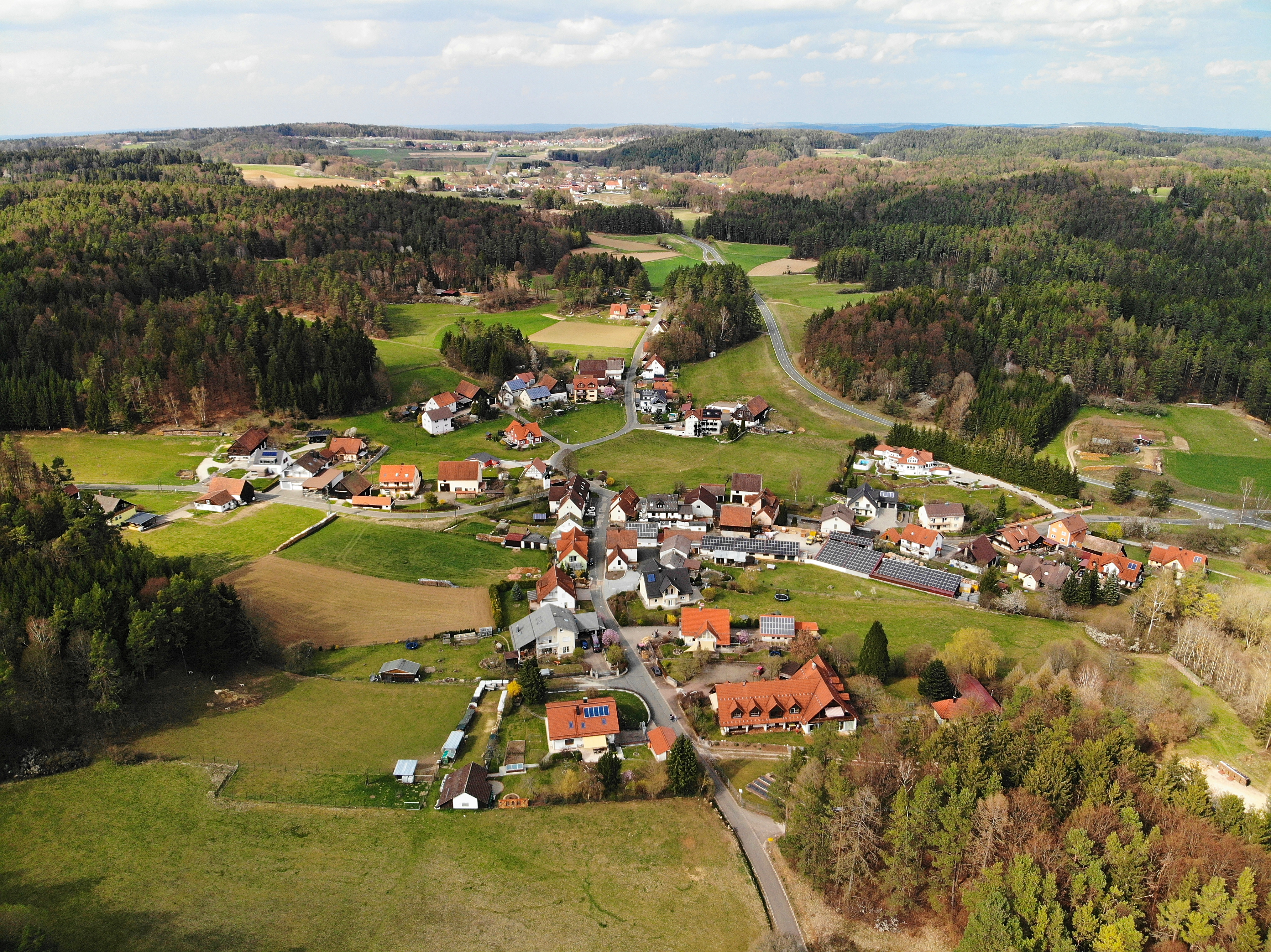 Herzogwind Luftaufnahme (2020)